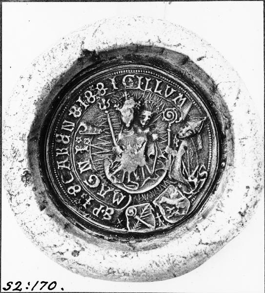 Sigill, Magnus Haraldsson, biskop i Skara 1550. Kategori: (11) Diverse Sigill, Magnus Haraldsson, biskop i Skara 1550.